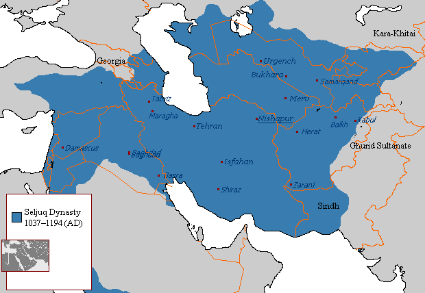 Seljuq dynasty